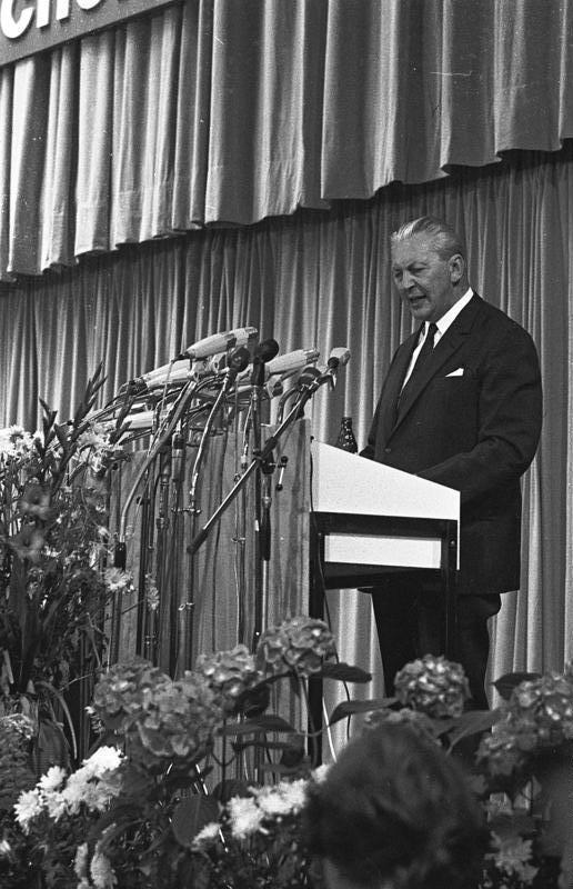 CSU-Parteitag München (Bundeskanzler Kiesinger)